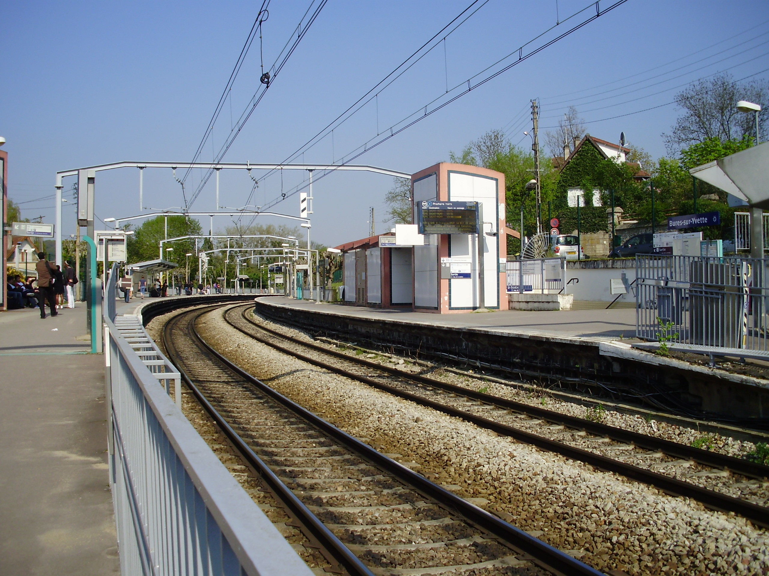 Gare de Bures-sur-Yvette, Essonne, France (quais et voies en regardant vers Aéroport CDG 2/Mitry - Claye, depuis l'extrémité ouest de la gare)